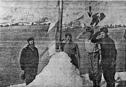 Inauguración del destacamento naval Melchior